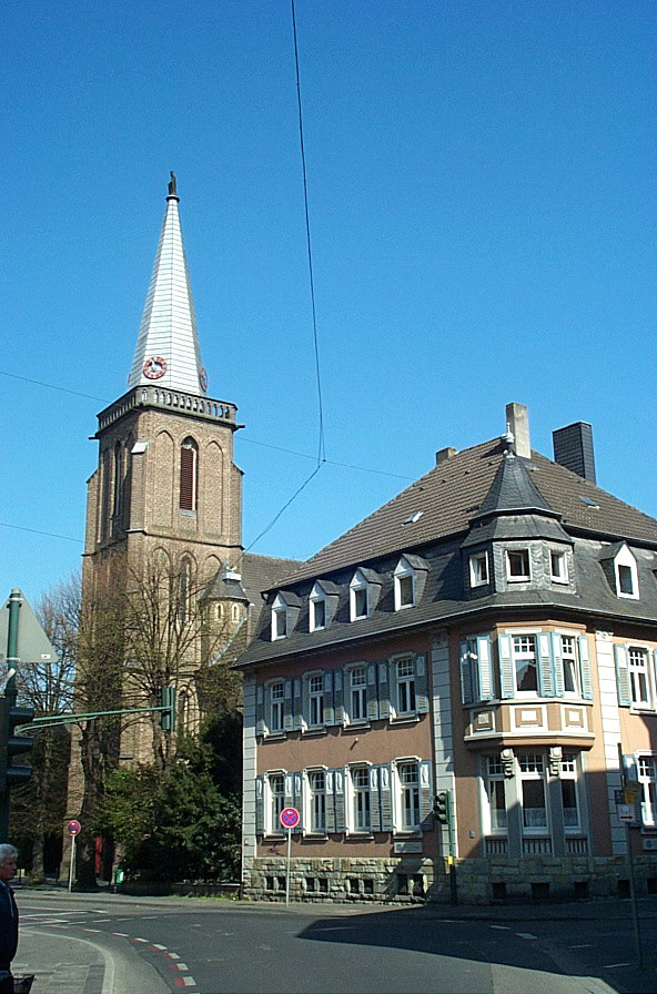 St. Remigius church in Leverkusen-Opladen, Germany